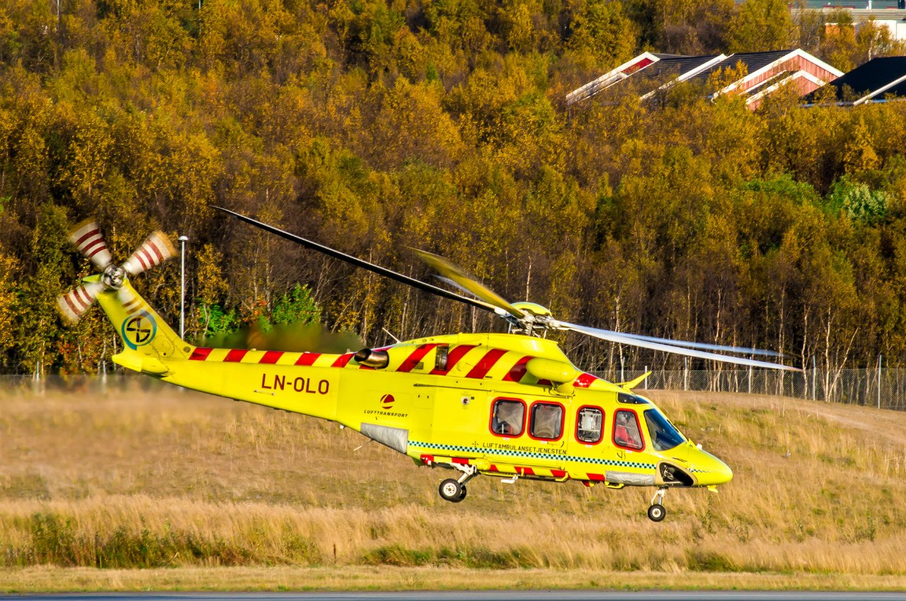 Agusta AW139 ambulance